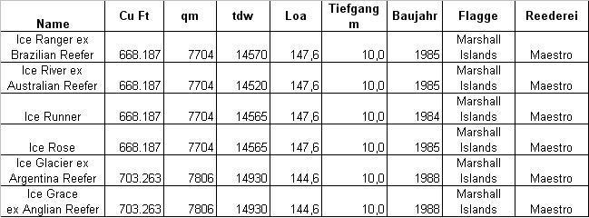 Tabelle mit Kühlschiffen der Reederei Maestro